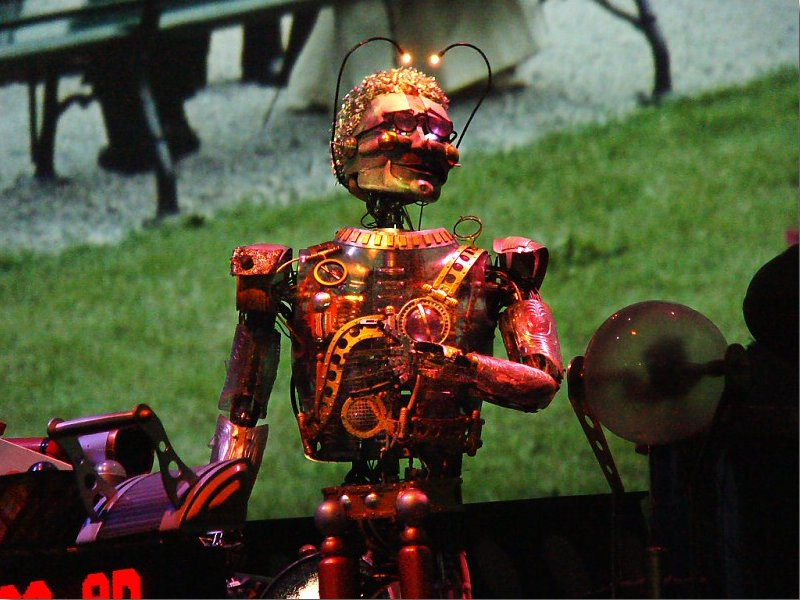 Timekeeper, notre hote dans le Visionarium.